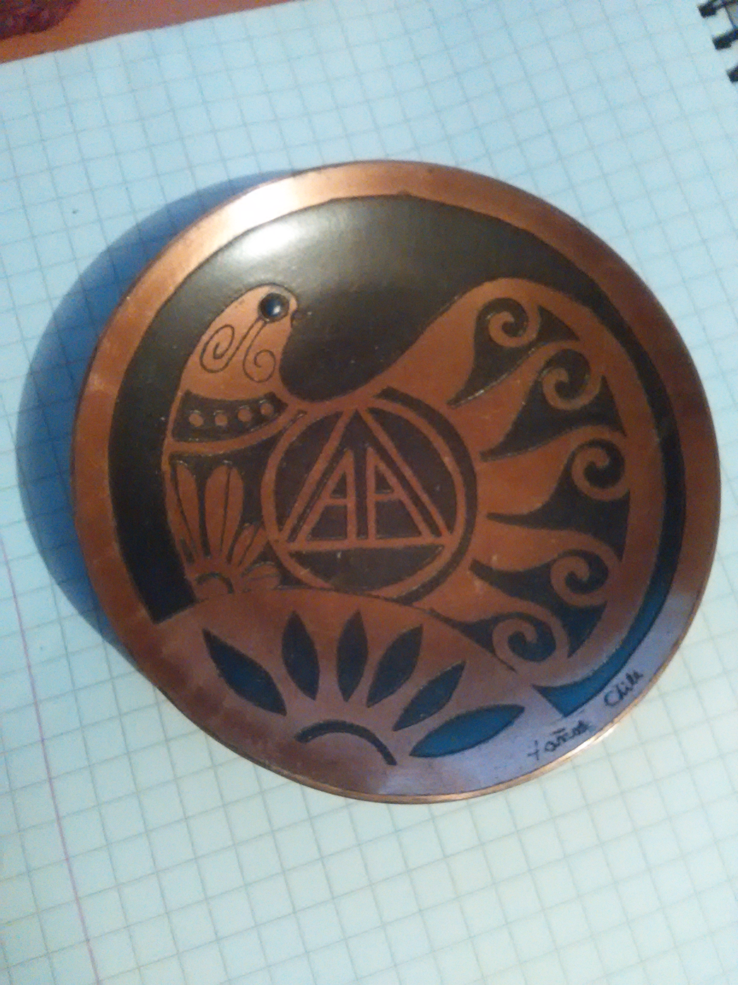 Placa de refuerzo en Alcohólicos Anónimos. Se otorgan a los que han logrado superar ciertos periodos sin beber.